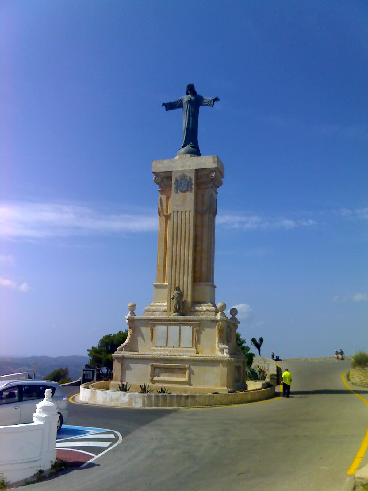 Socha Ježíše na vrchu El Torro, Menorca